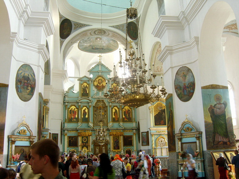 Жыровіцы. Інтэр'ер Успенскага сабора